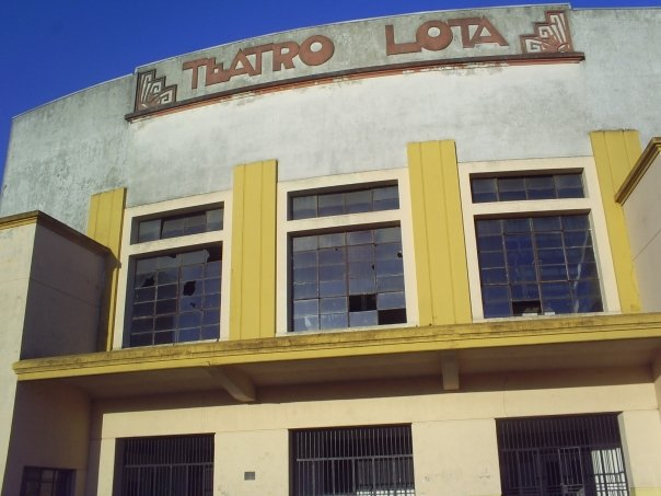 Teatro Lota